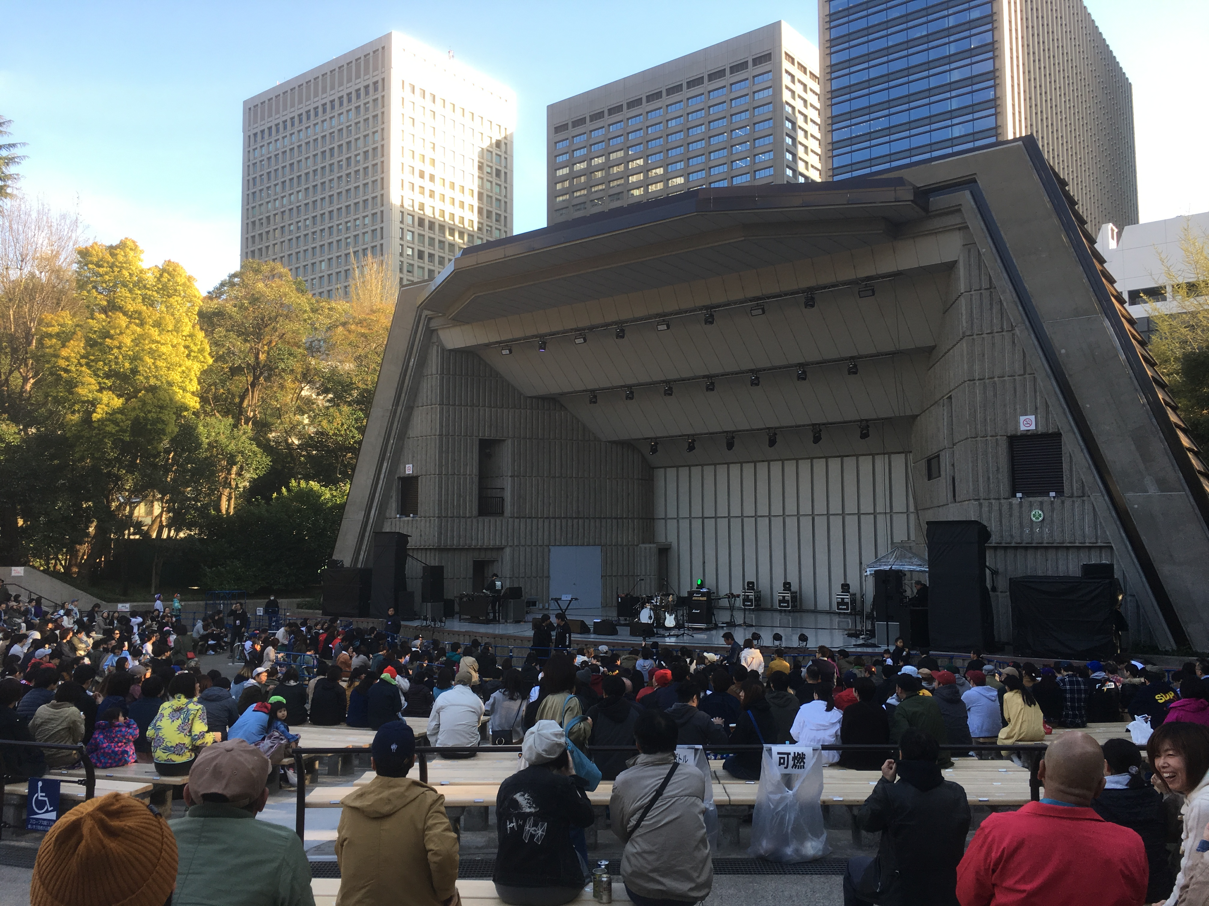 日比谷公園 (Hibiya Park)